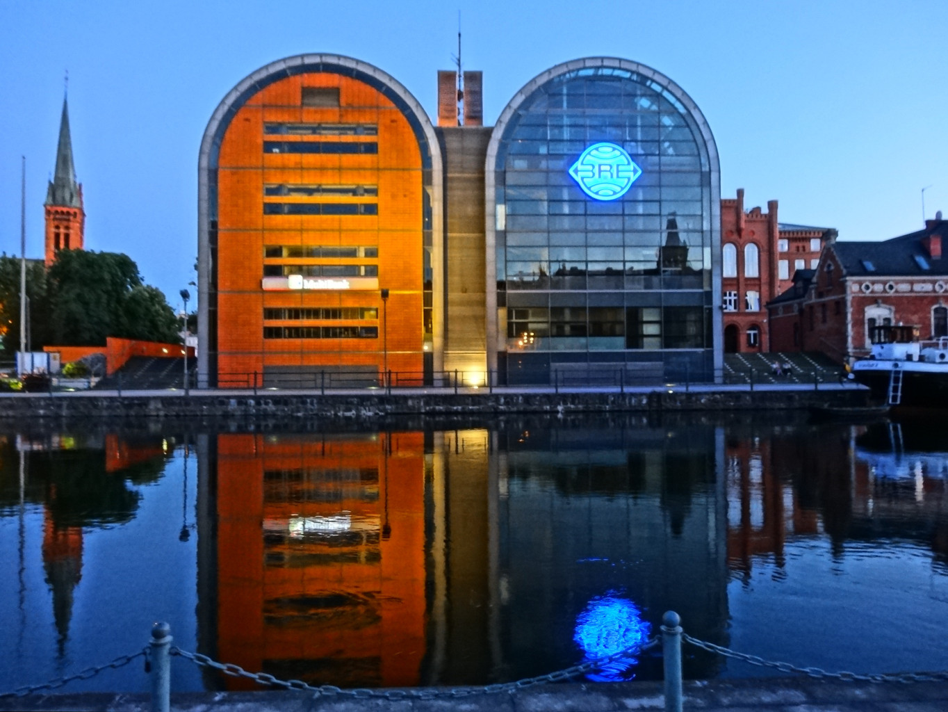 Zespół budynków BRE Banku w Bydgoszczy przy ulicy Grodzkiej, zwanych "szklanymi spichrzami", zbud. w 1998 r.